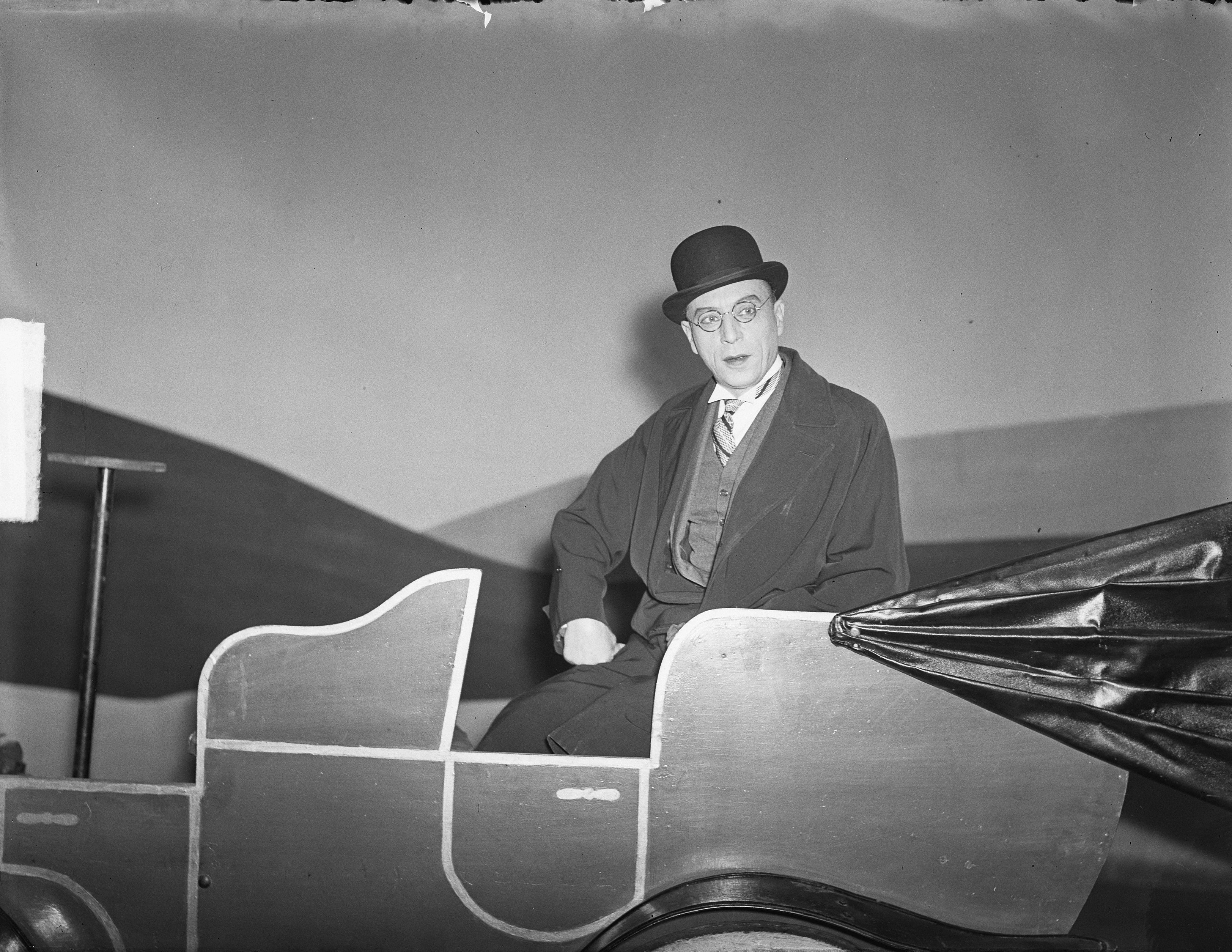 Collectie / Archief : Fotocollectie Anefo Reportage / Serie : [ onbekend ] Beschrijving : Louis Jouvet in Knock. Annotatie : Franse acteur en theaterregisseur in toneelstuk van MoliÃ¨re Datum : 6 maart 1950 Trefwoorden : acteurs, toneel Persoonsnaam : Jouvet, Louis Fotograaf : Nijs, Jac. de / Anefo Auteursrechthebbende : Nationaal Archief Materiaalsoort : Glasnegatief Nummer archiefinventaris : bekijk toegang 2.24.01.09 Bestanddeelnummer : 903-8511